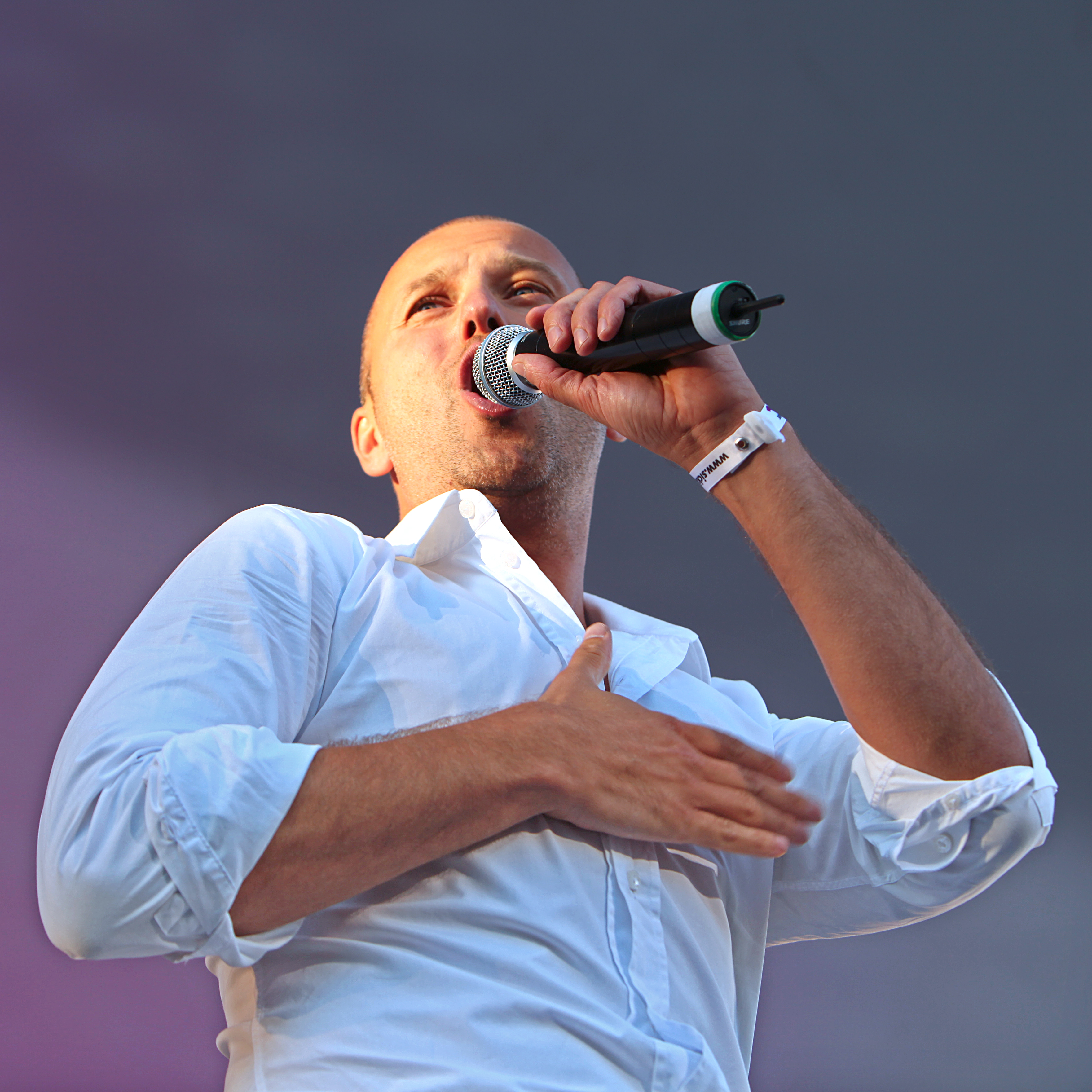 Niklas Andersson at Stockholm Pride 2009